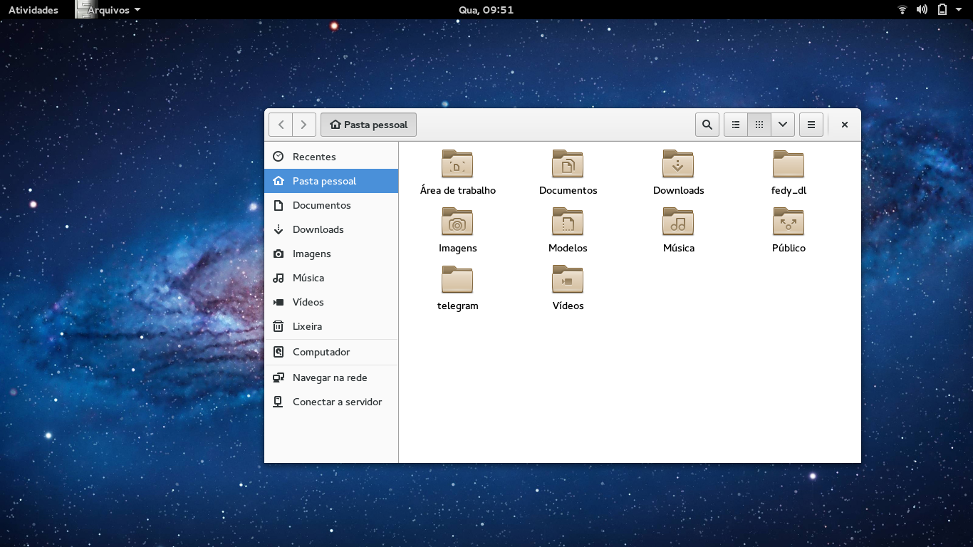 Gerenciador de arquivos Nautilus (Fedora 21)